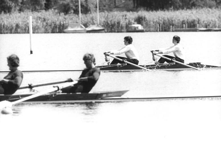 B. Peter, R. Balthasar, M. Schröter, S. Schwabe ADN-ZB Kluge 21.7.85 Brandenburg: DDR-Meisterschaften im Rudern- Martina Schröter und Sylvia Schwabe (SC DHfK Leipzig-SC Dynamo Potsdam oben) holten sich den Titel im Doppelzweier auf dem Brandenburger Beetzsee. Birgit Peter und Ramona Balthasar (SC Dynamo Berlin-SG Dynamo Potsdam-unten) wurden Vizemeister.